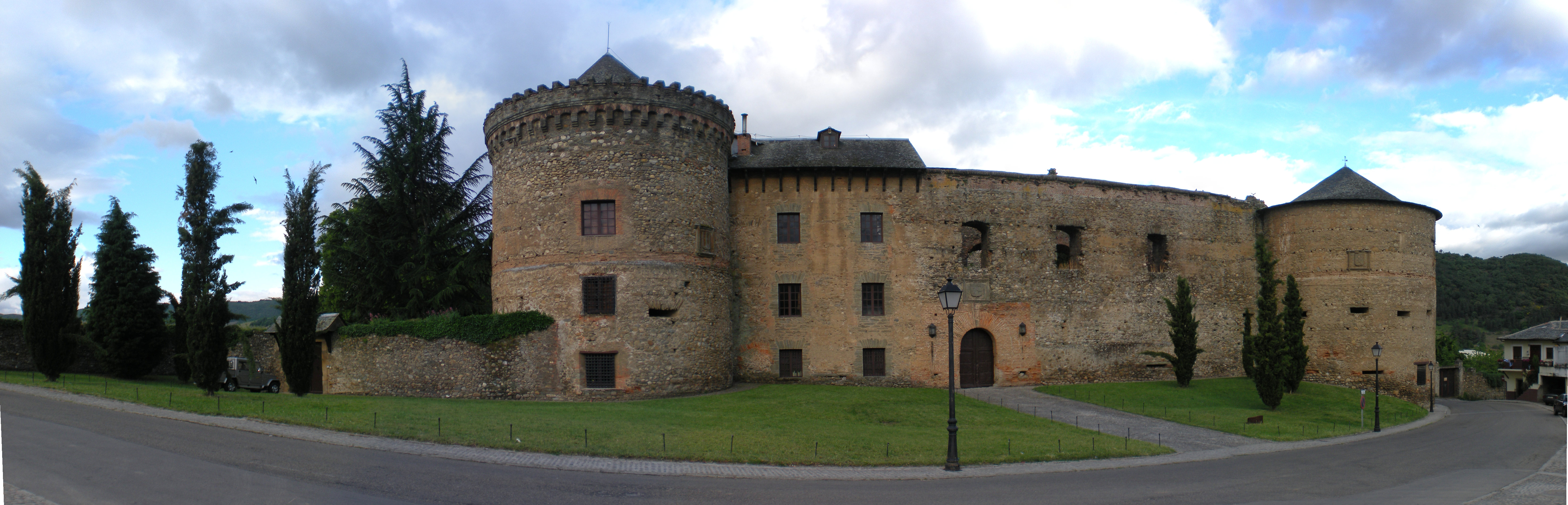 Panorámica del castillo de Villafranca el Bierzo (León), realizada con cinco fotografías tomadas el 25 de Mayo del año 2010. Todo el proceso ha sido llevado a cabo bajo sistemas GNU/Linux, con los programas Hugin y GIMP.